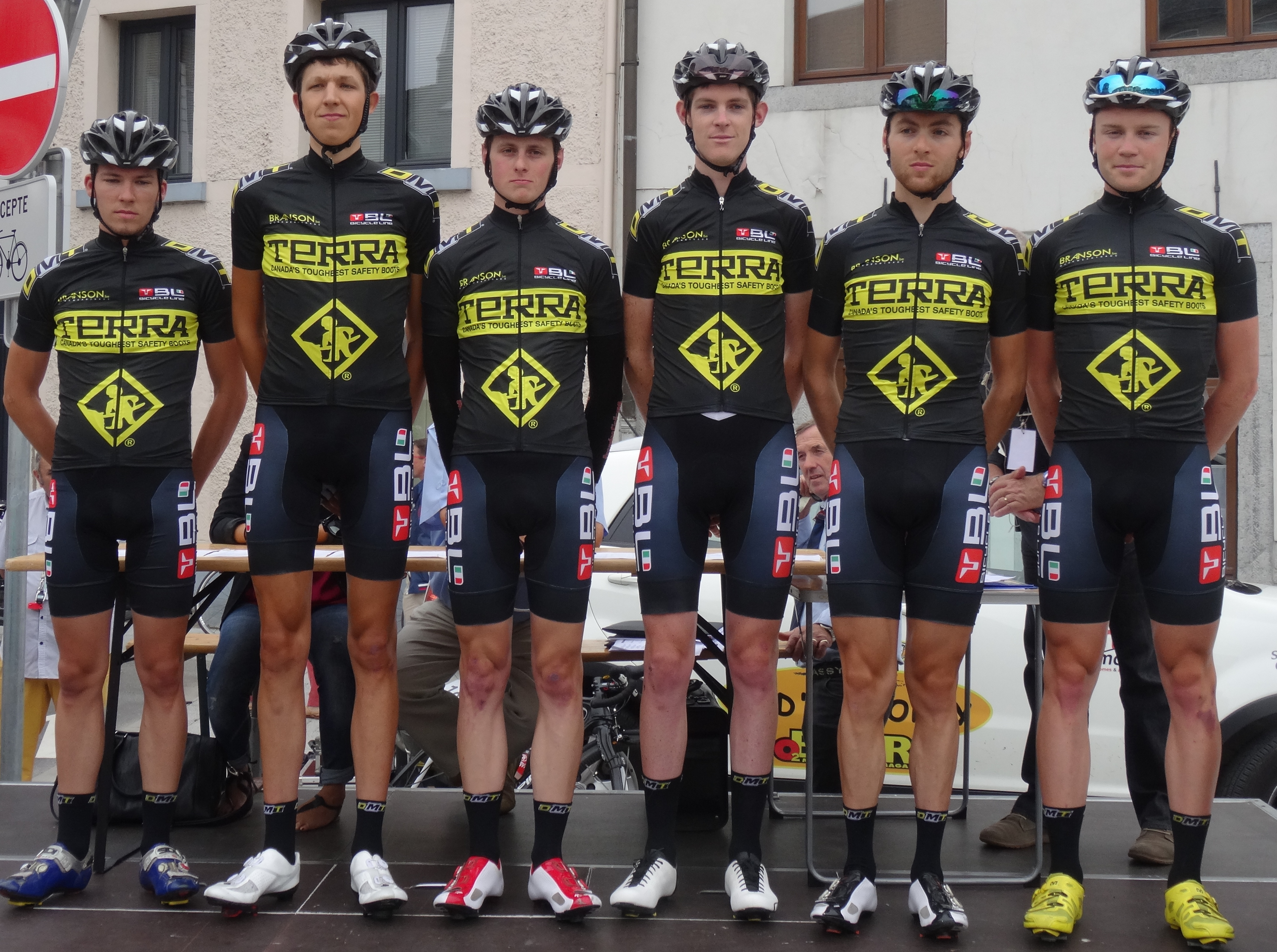 Reportage photographique réalisé le mercredi 6 août à l'occasion du départ de la première étape du Tour de la province de Namur 2014 à Jambes (Namur), Belgique.